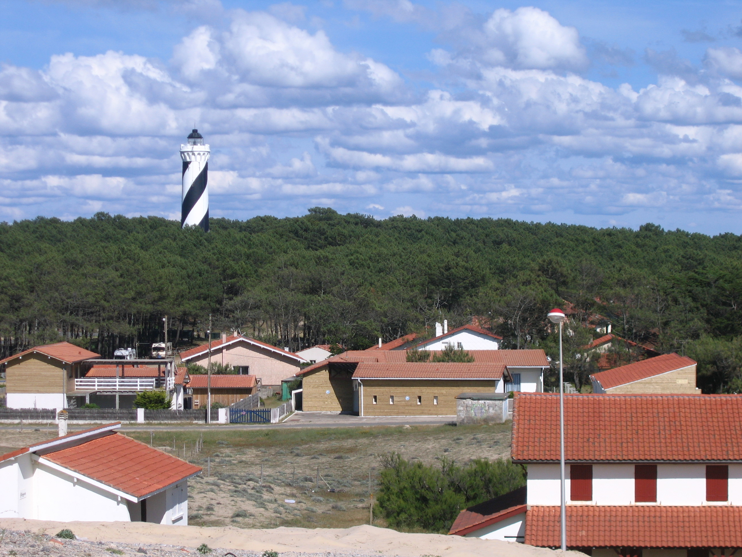 Saint Julien en Born, le le Phare de Contis.- Département des Landes)